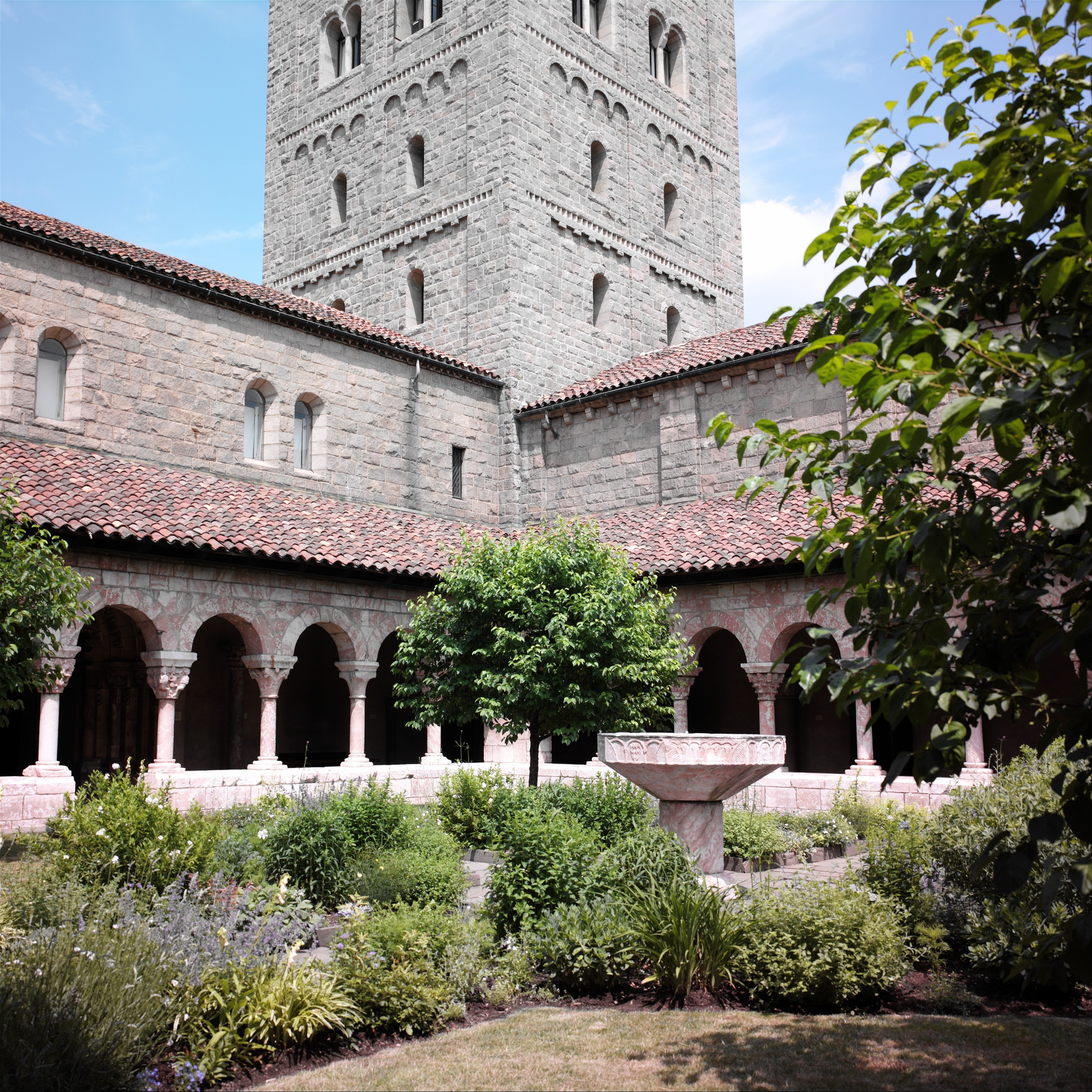 Catalan; Cloister; Sculpture-Architectural-Stone